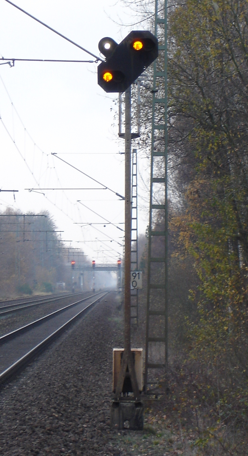 Eisenbahnsignal Vr0 Licht als Wiederholungssignal